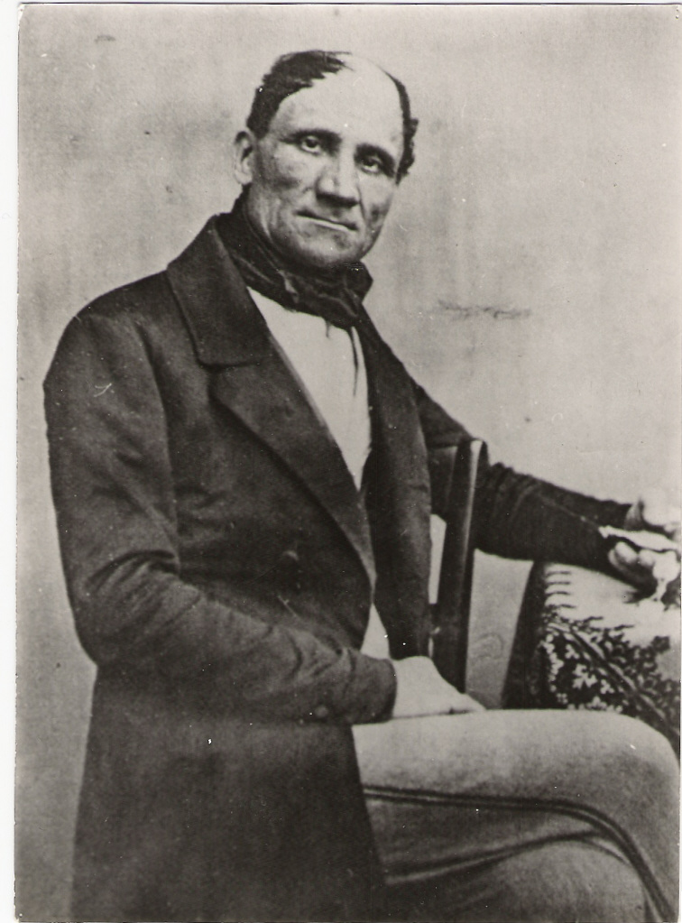 physician - inventor